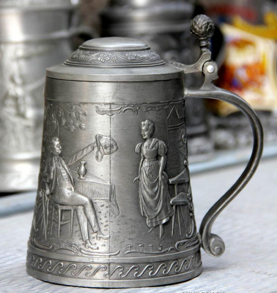 ein deutsche Zinnbecher,das bild ist Aennchen Schumacher